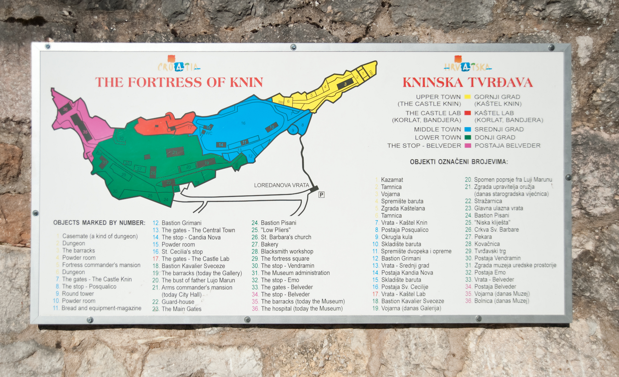 16. obljetnica vojnoredarstvene operacije Oluja u Kninu